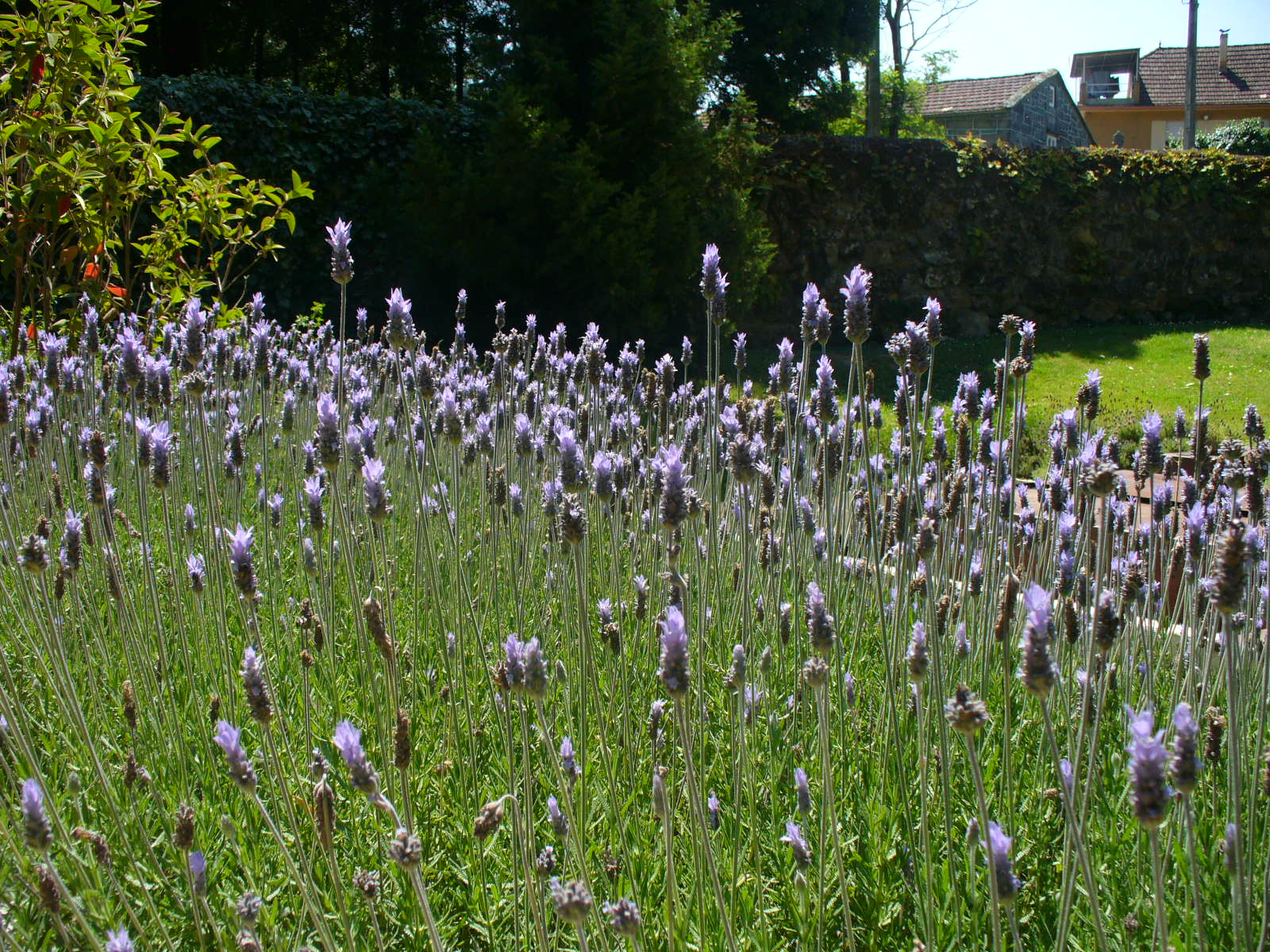 Lavendo en la sensoghardeno.